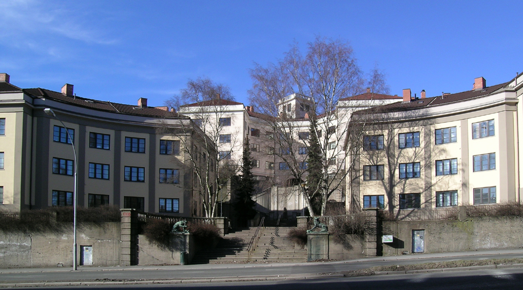 Ilatrappa, Uelands gate, Oslo.